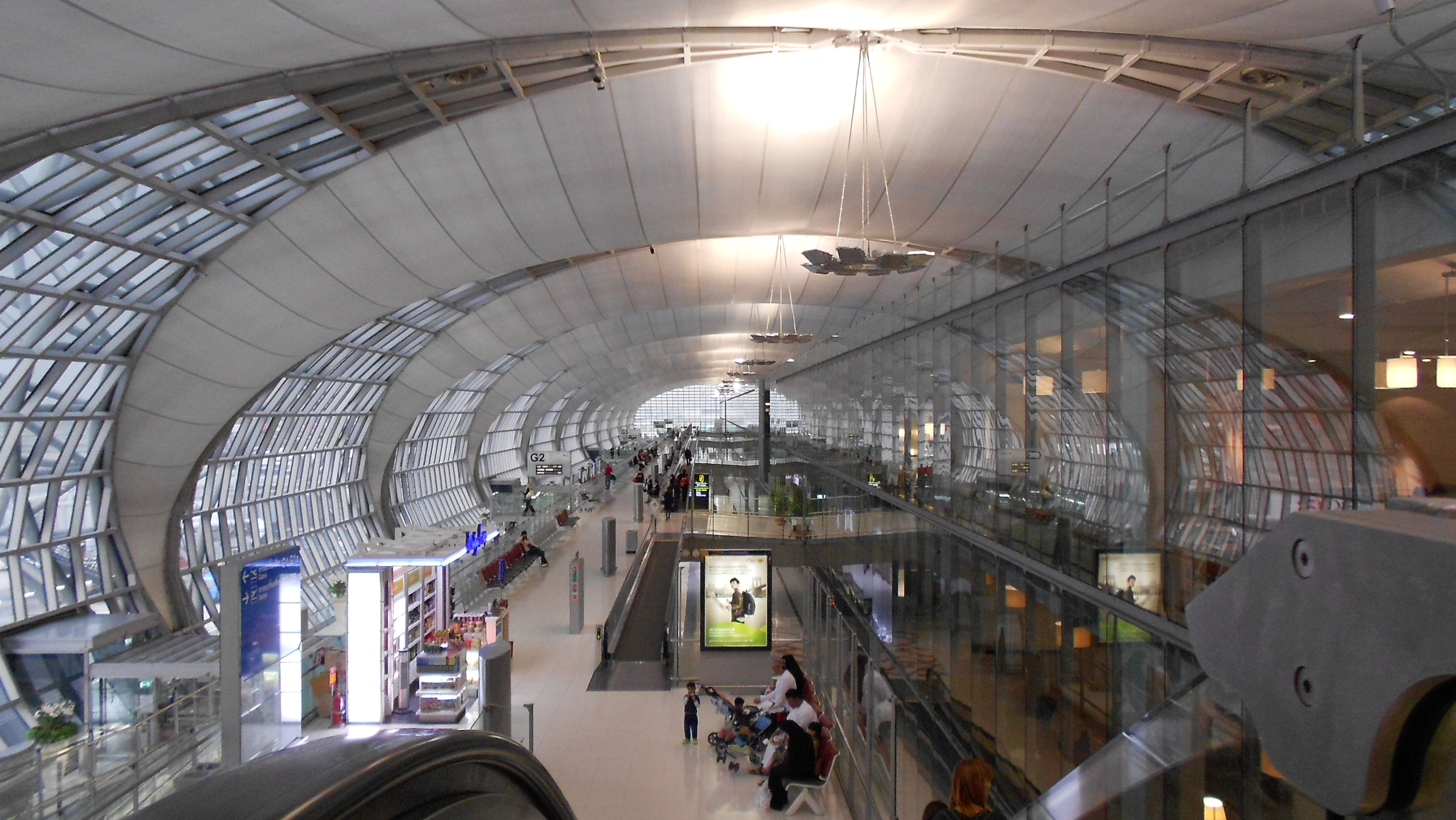 BKK Airport, Abflugbereich (Gates)